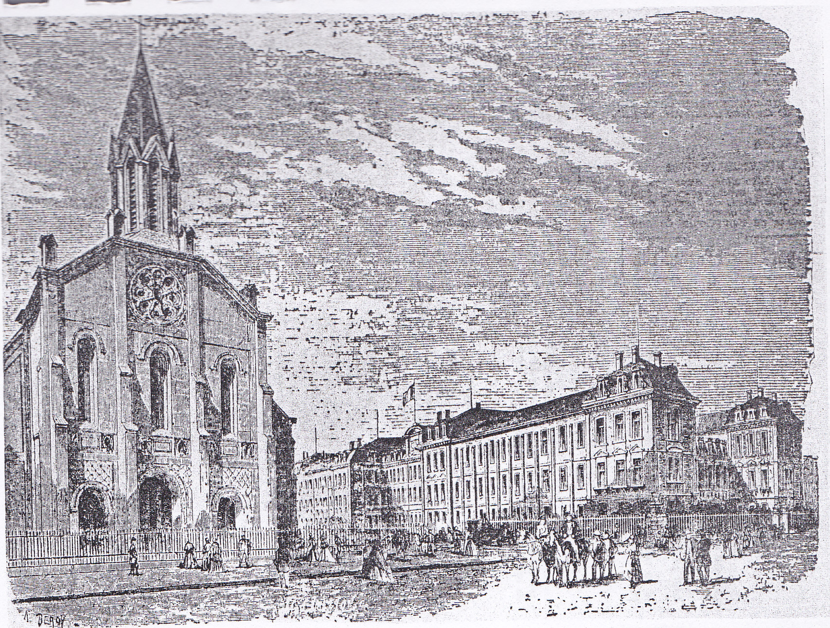 Gravure du Lycée François 1er